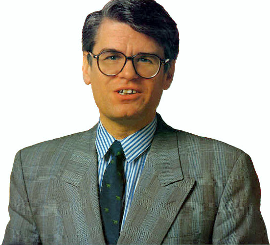 Portraitfoto Joachim Erwin (CDU).